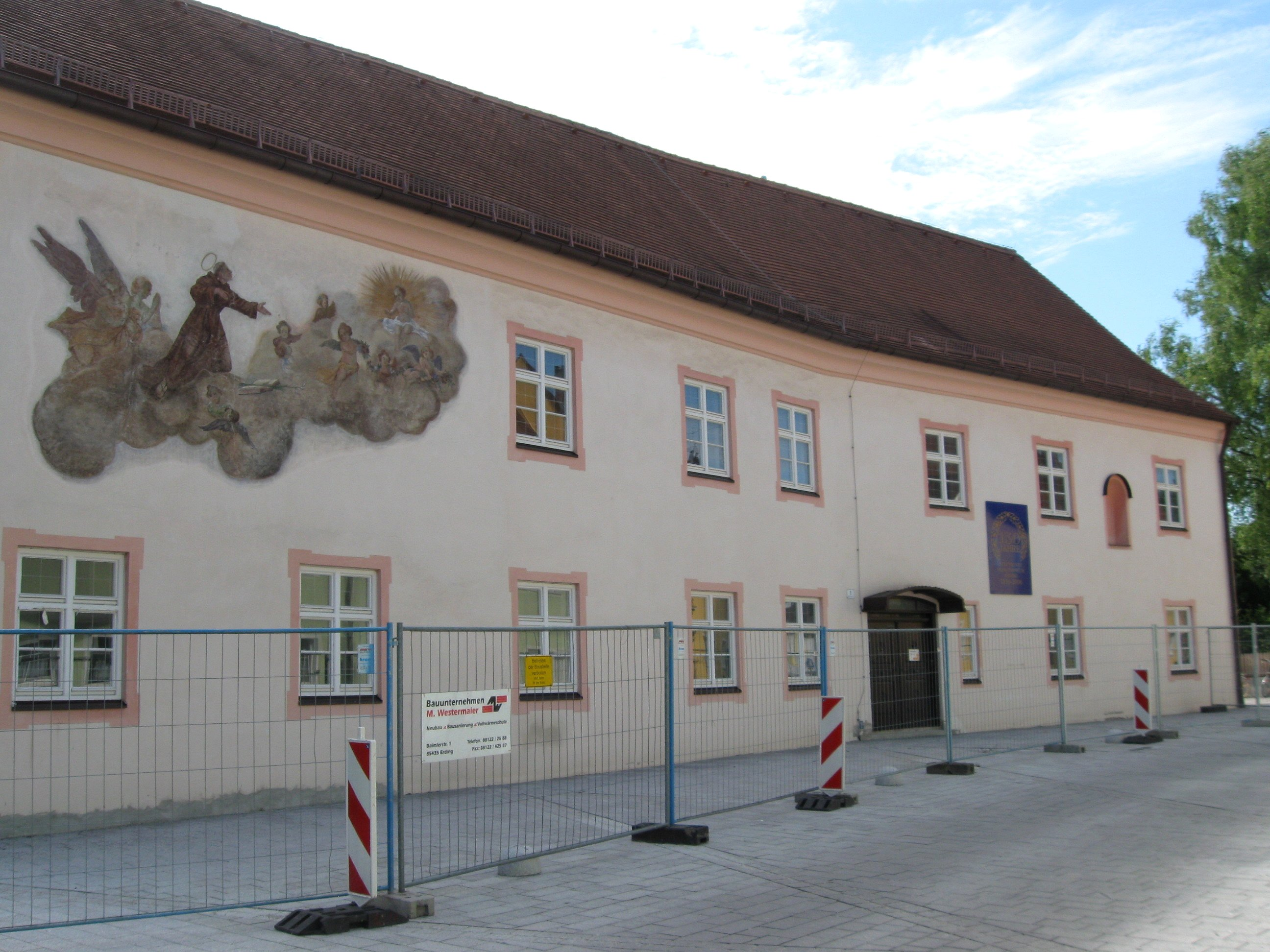 Prielmayerstraße 1. Kindergarten St. Antonius, Traufseitbau, wohl 18. Jh., mit Wandmalereien und Hausmadonna.